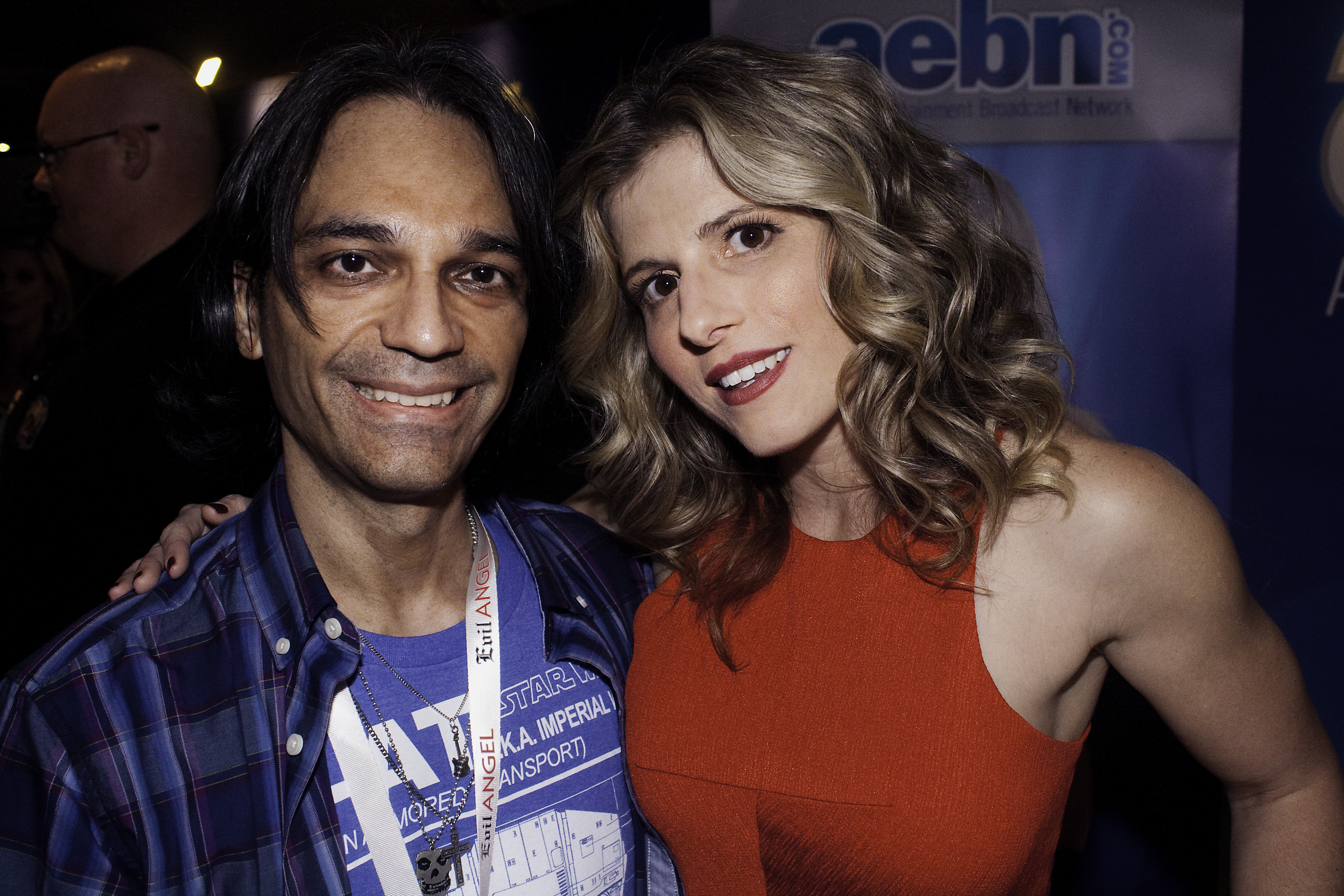 AEE16_0166c